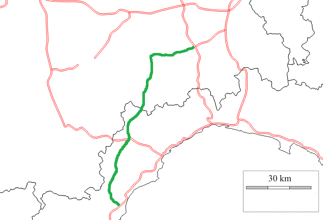 Tracciato dell'autostrada prevista Predosa (AL) - Albenga (SV).